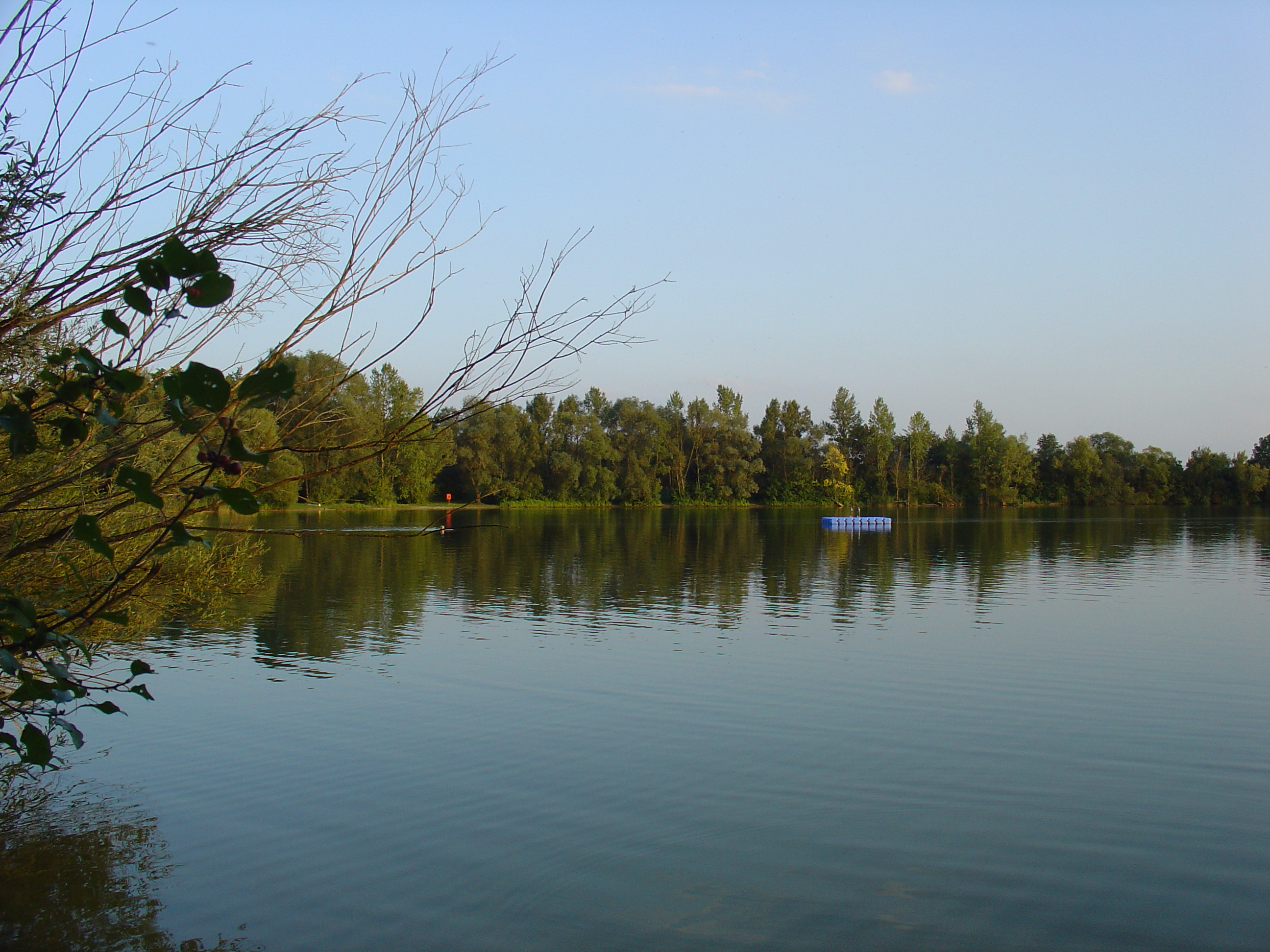 Ostufer des Sarchinger Weihers (2007)